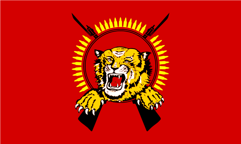 bandera para ña copa mundial viva